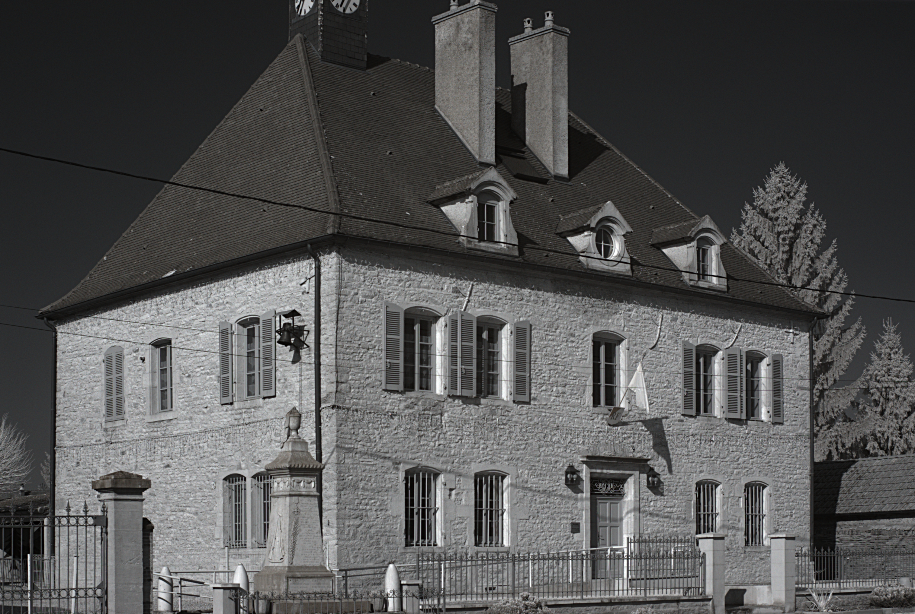 Mairie, Bonnencontre (Côte d'Or, Bourgogne, France) photographié avec un filtre infrarouge 760 nm.